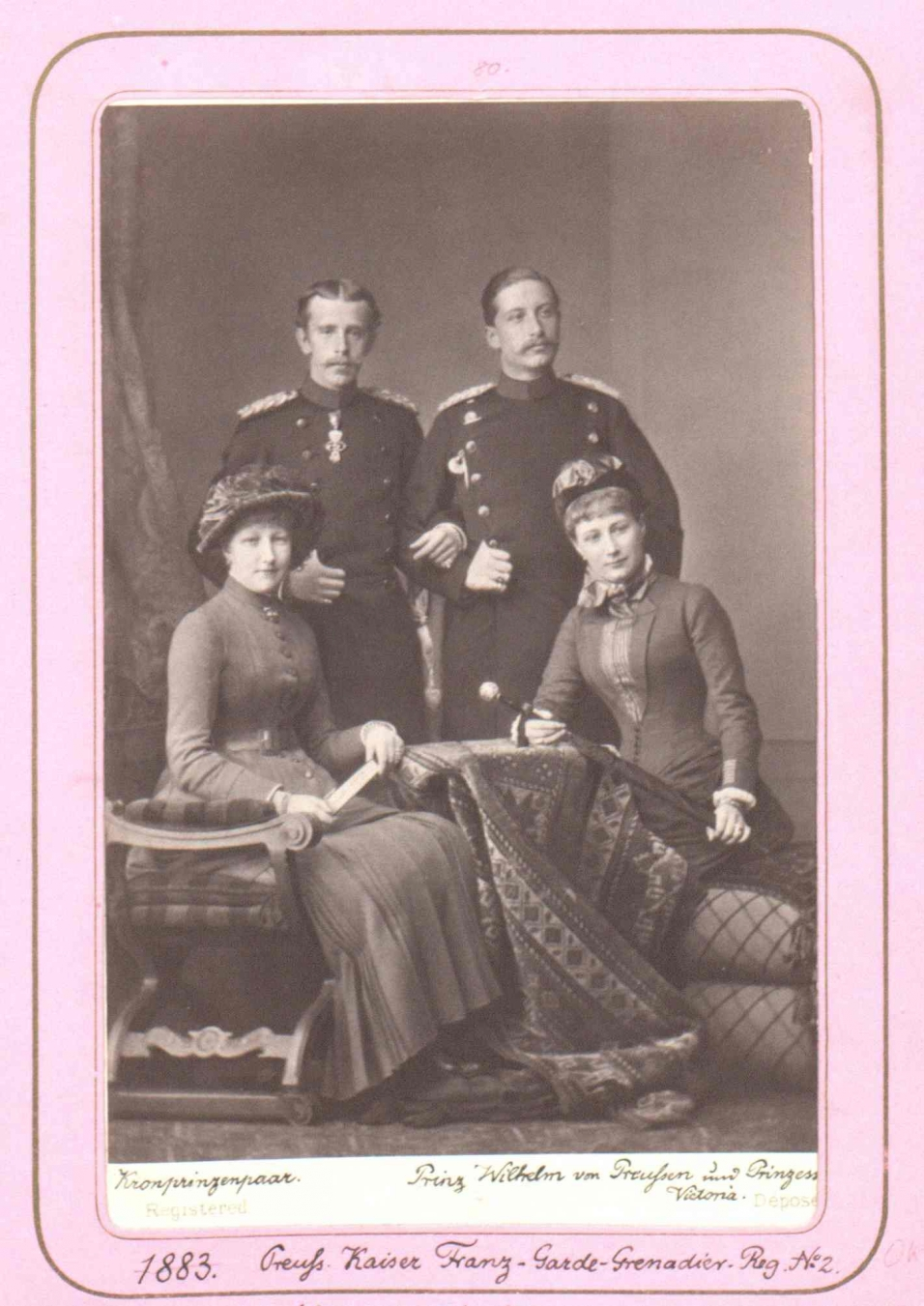 Rudolf és II. Vilmos feleségeikkel